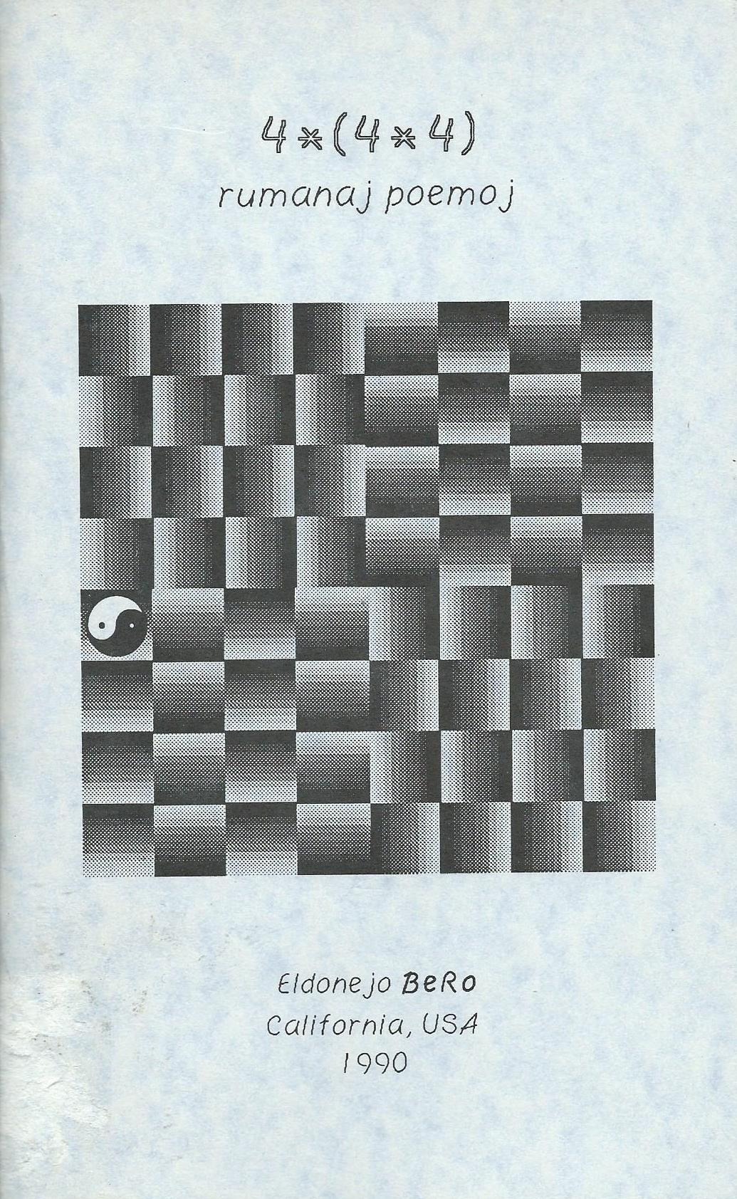 Librokovrilo de "Rumanaj Poemoj",1990